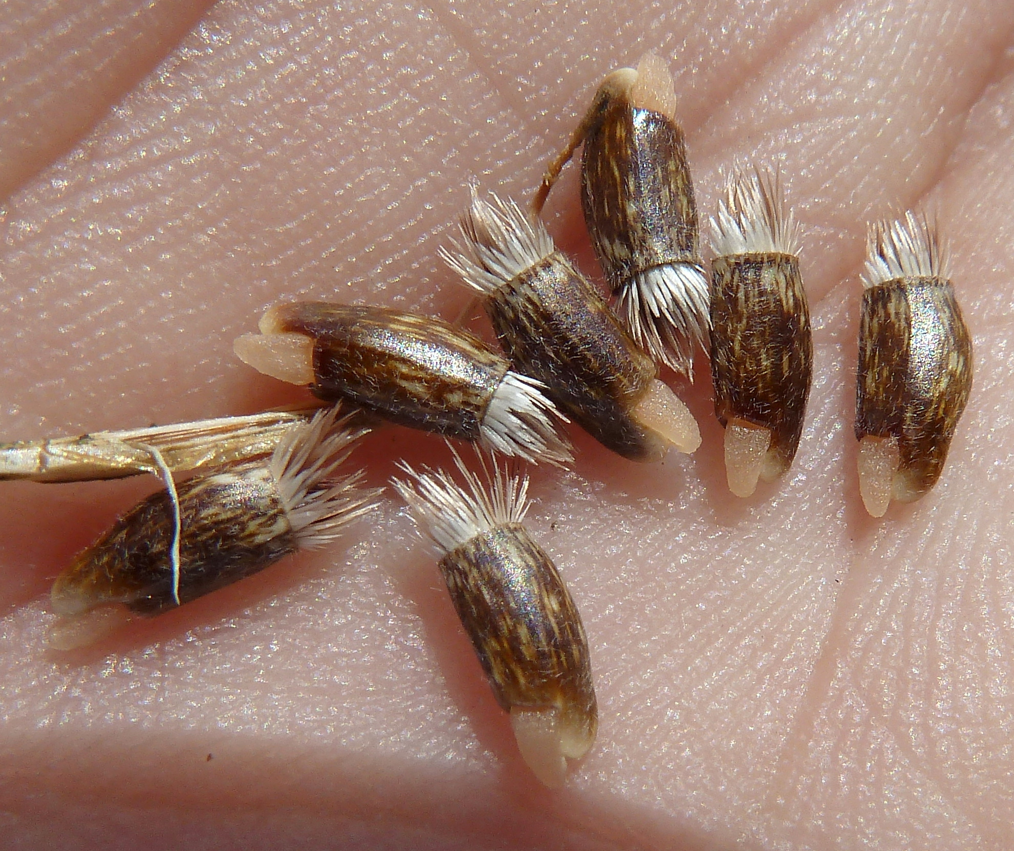 Centaurea seridis (Arzolla) - Cipselas, con vilano y eleosoma - Albatera, Alicante (España)